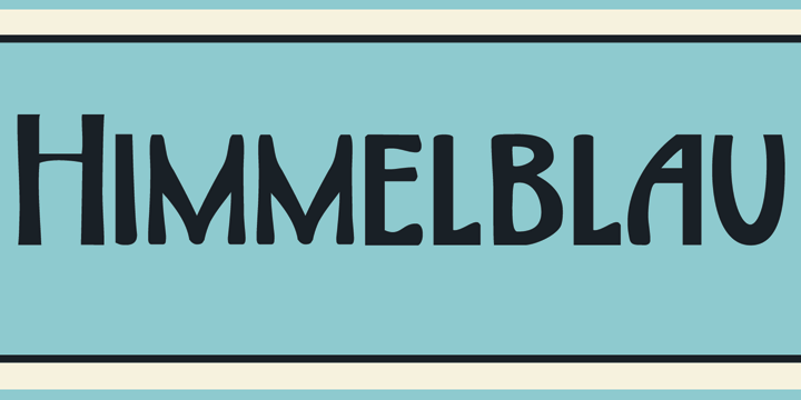 הכיתוב הימלבלאו (צבע השמים), ברקע הצבע תכלת-שמים